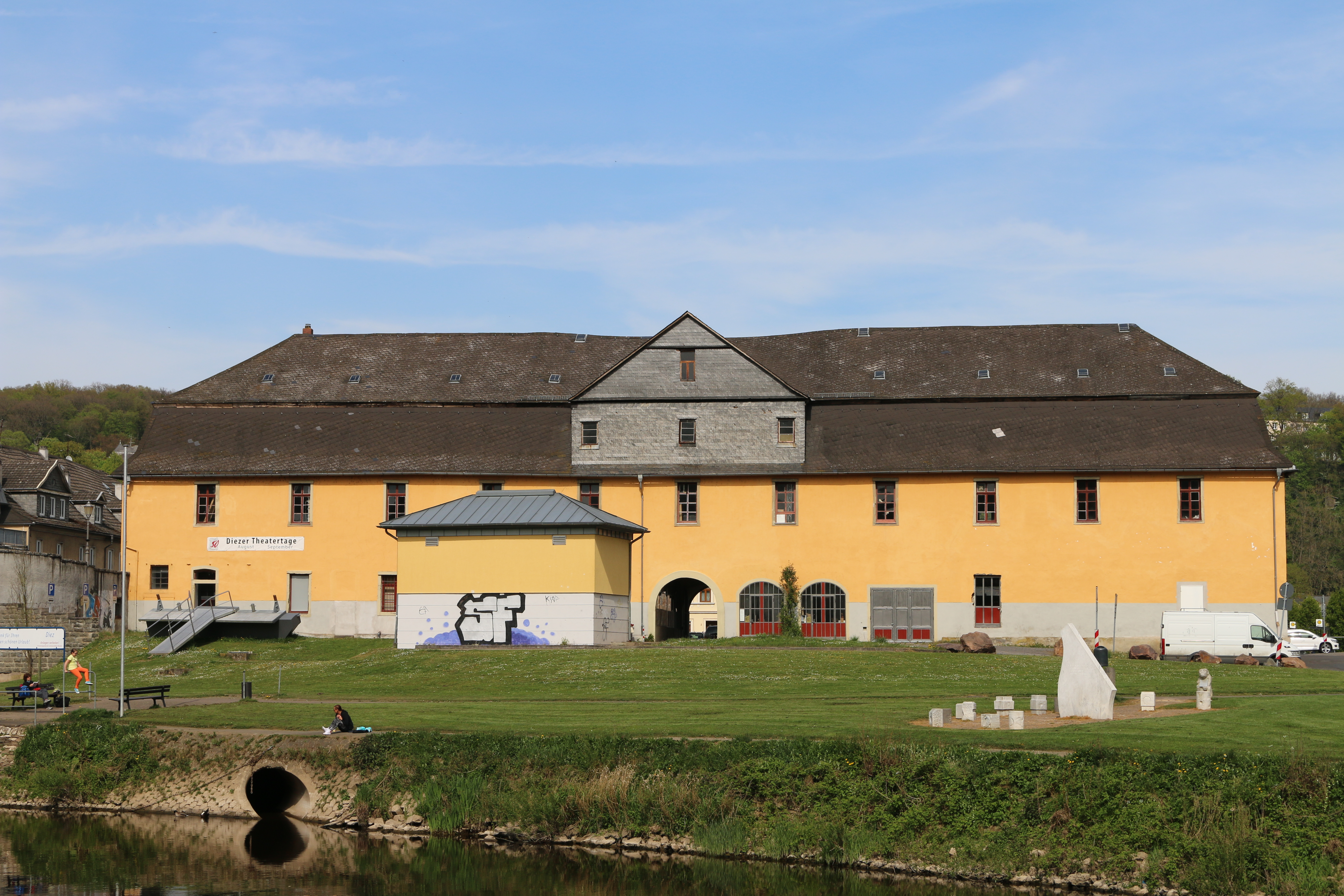 Der Getreidespeicher in Diez, ehemalige nassauische Kaserne